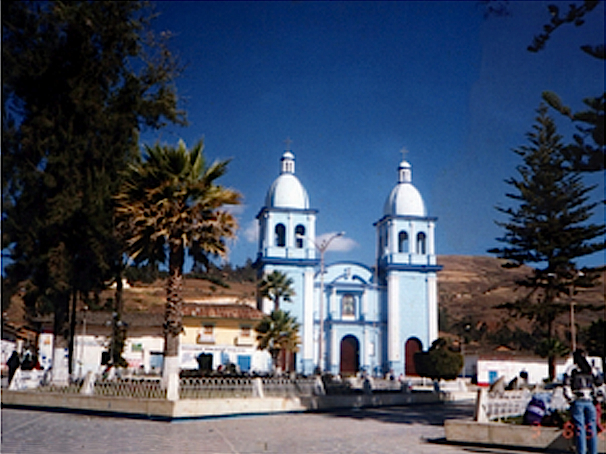 Vista de la Plaza Mayor de Celendín y de la Iglesia Nuestra Señora del Carmen.